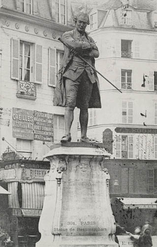 Louis Clausade (1862–1899): Denkmal für Pierre-Augustin Caron de Beaumarchais, Kreuzung rue des Tournelles/rue Saint-Antoine, Paris (1897). Zeitgenössische Fotografie. Musée d'Orsay, Fonds Debuisson.